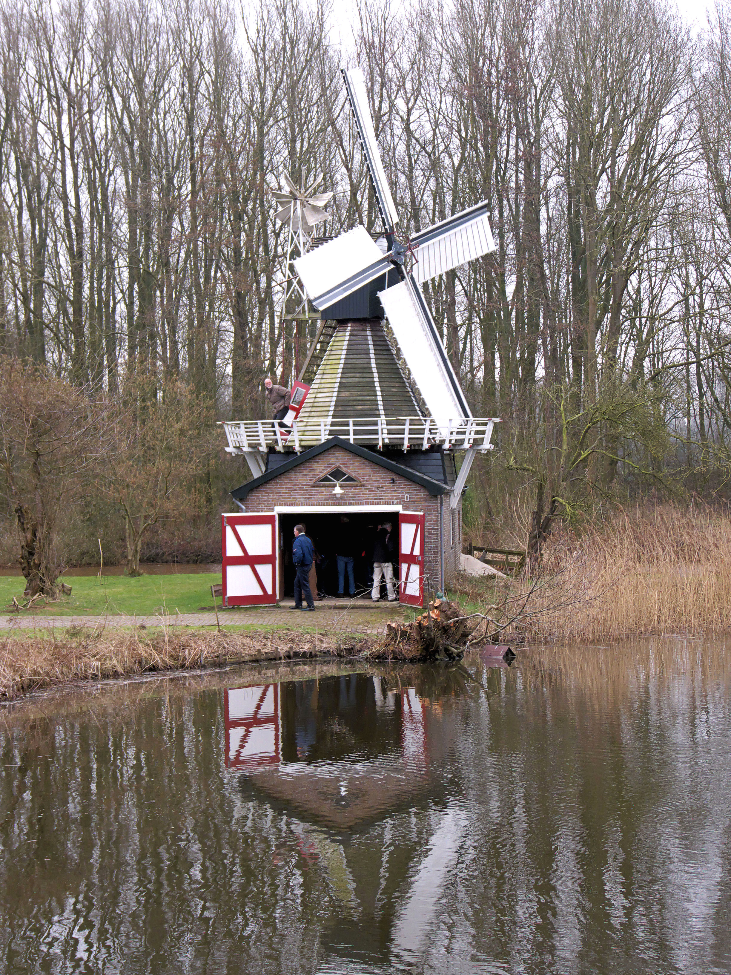 Spinnenkopmolen Wedderveer